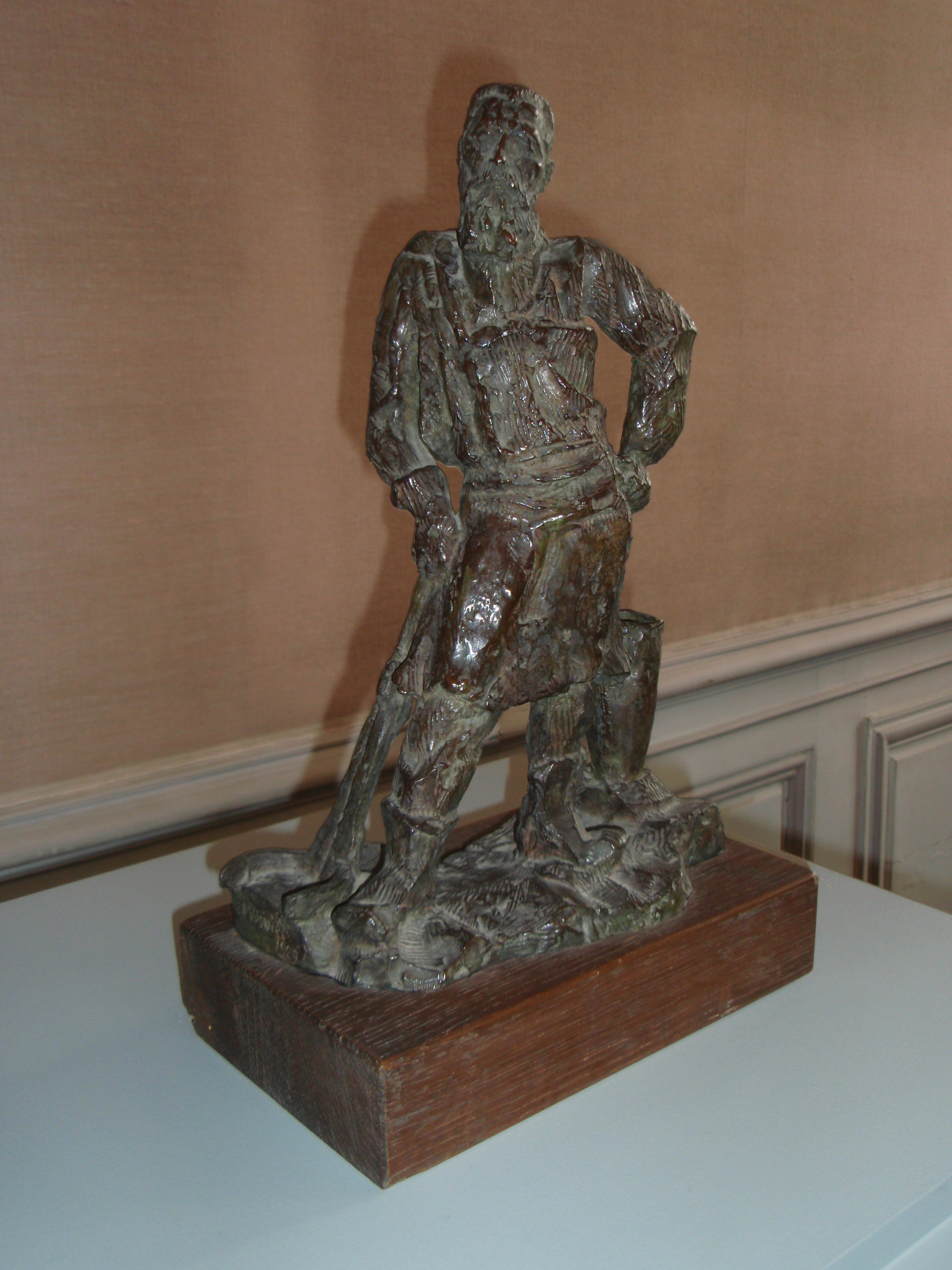 Portrait du fondeur Eugène Rudier par le sculpteur Emile Bourdelle en 1902. Musée Rodin de Paris